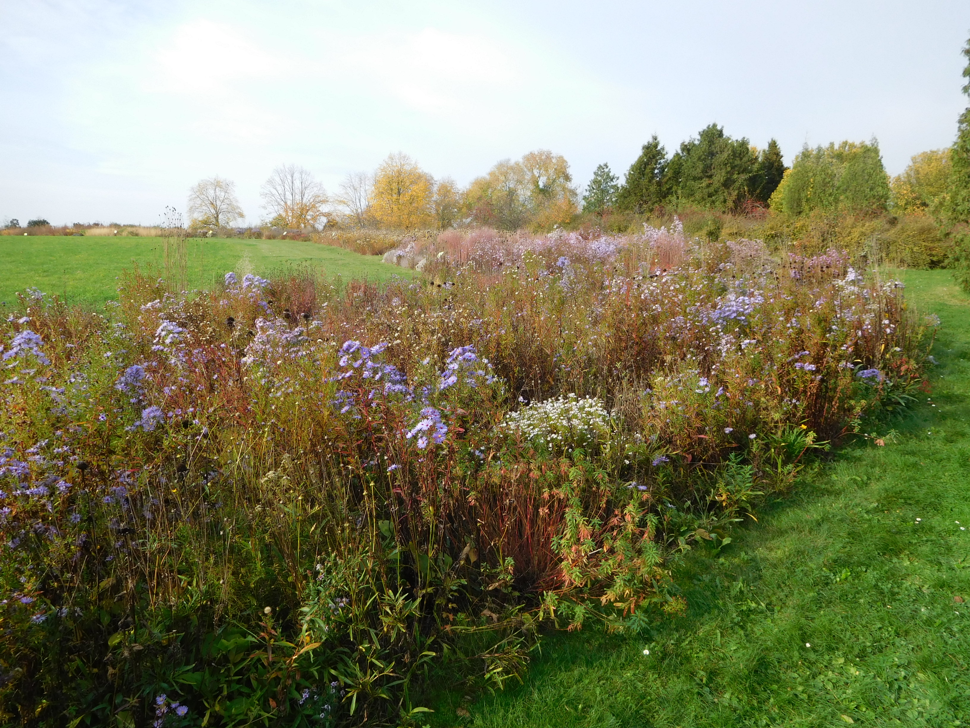 Průhonice - Dendrologická zahrada, pokusné trvalkové záhony